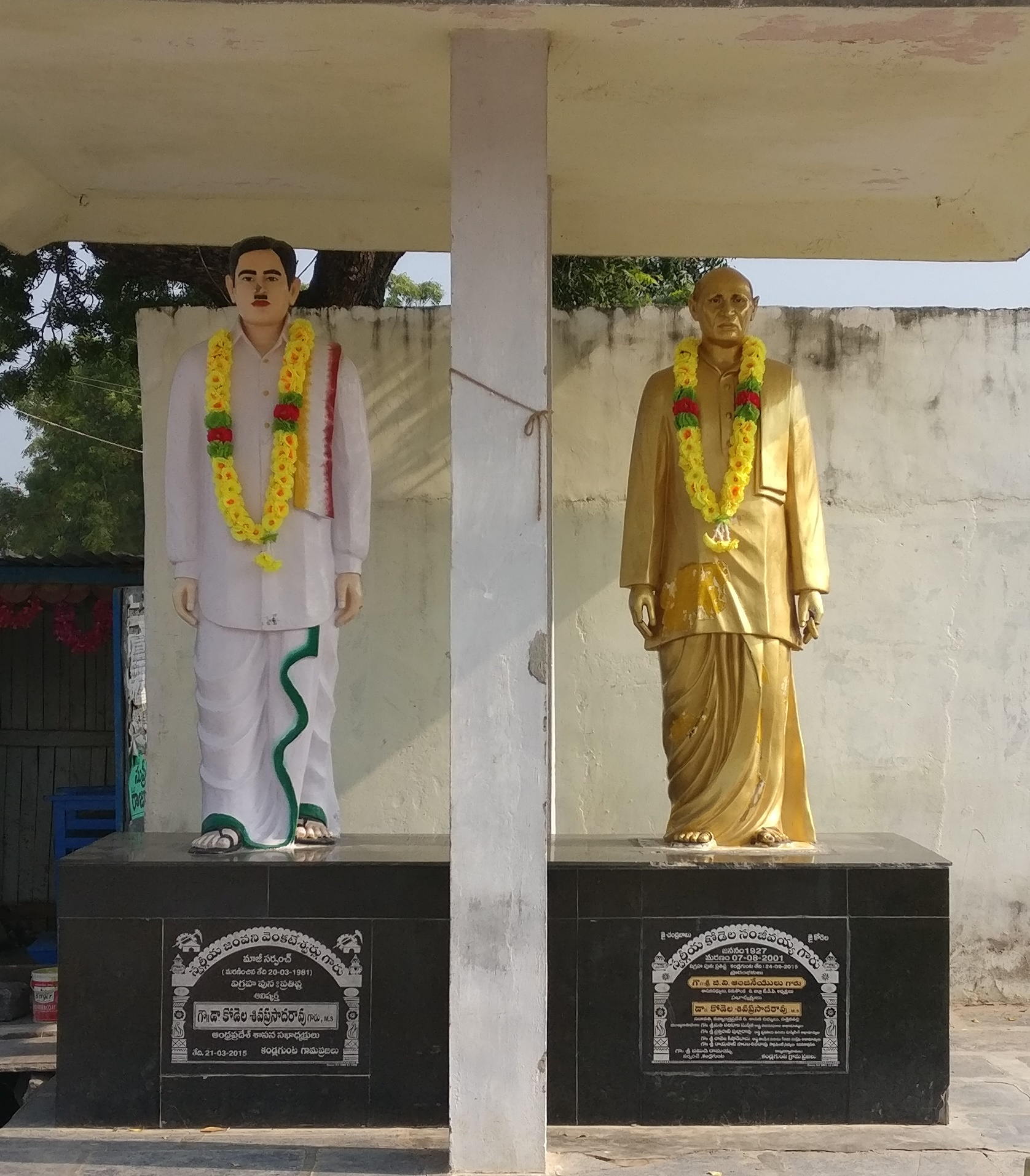 Statues in Kandlagunta Village